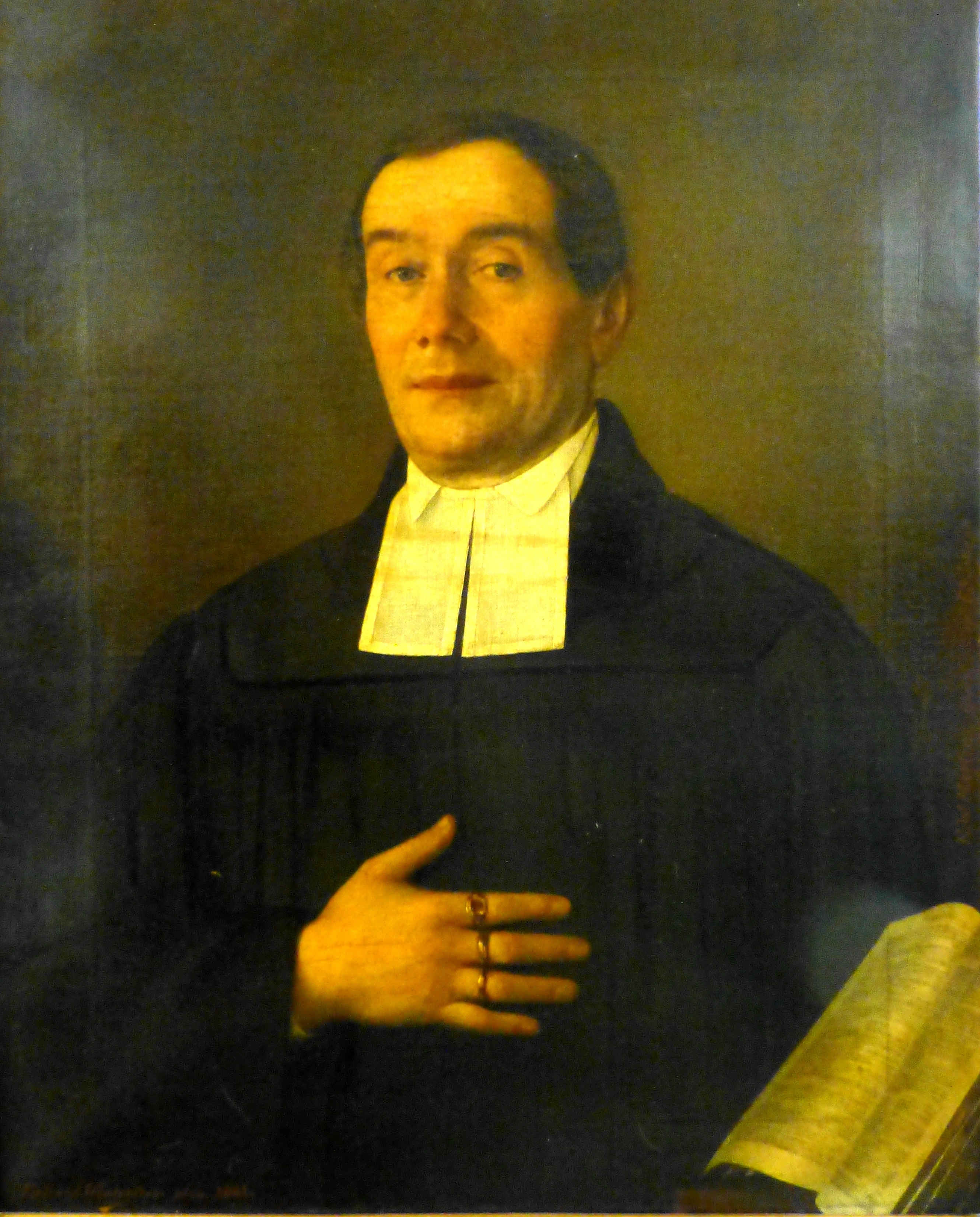 Porträt des Radeberger Superintendenten Ernst Wilhelm Martini (1798-1870), gemalt 1861